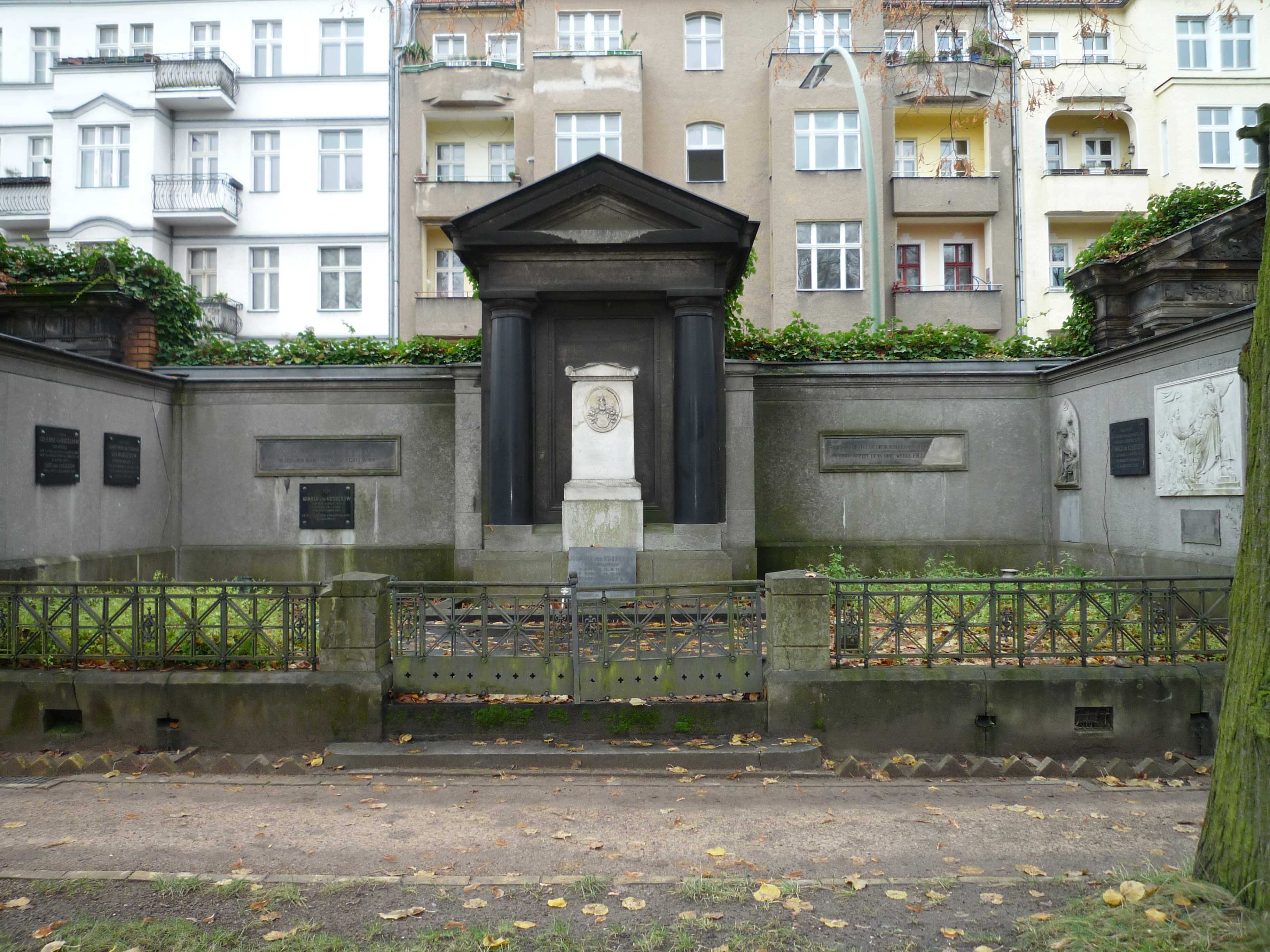 Alter St.-Matthäus-Kirchhof Berlin, Familiengrab Heinrich von Kusserow / Foto: Wolfgang Schindler